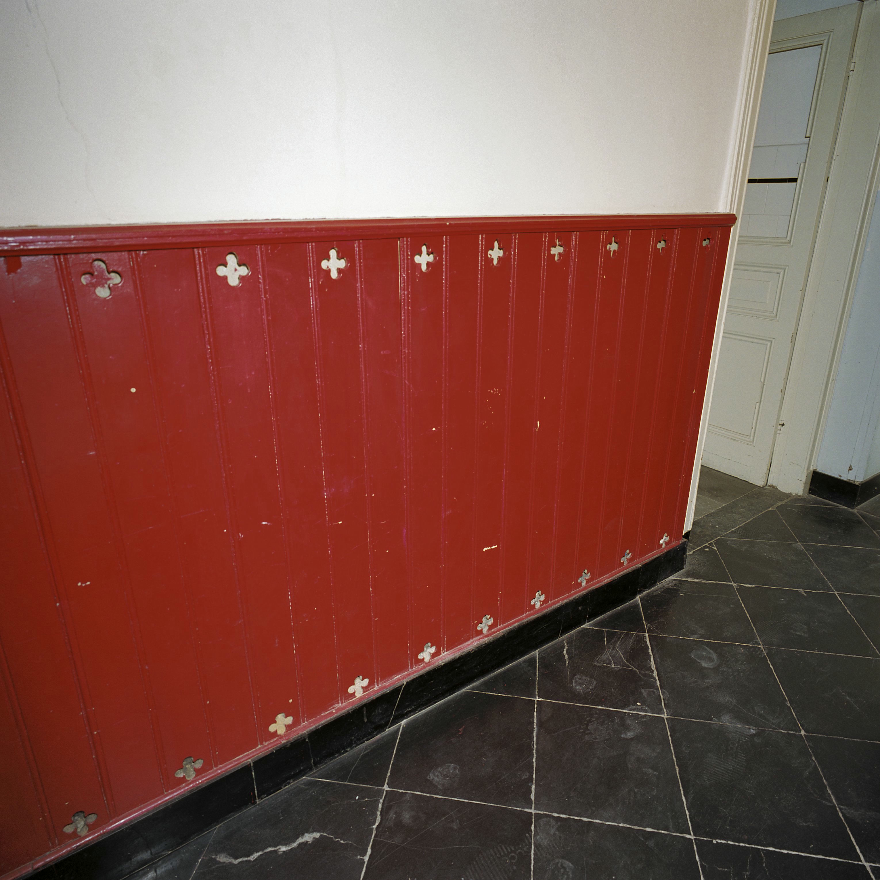 La Grande Suisse: Interieur, houten lambrisering met vierpas motieven